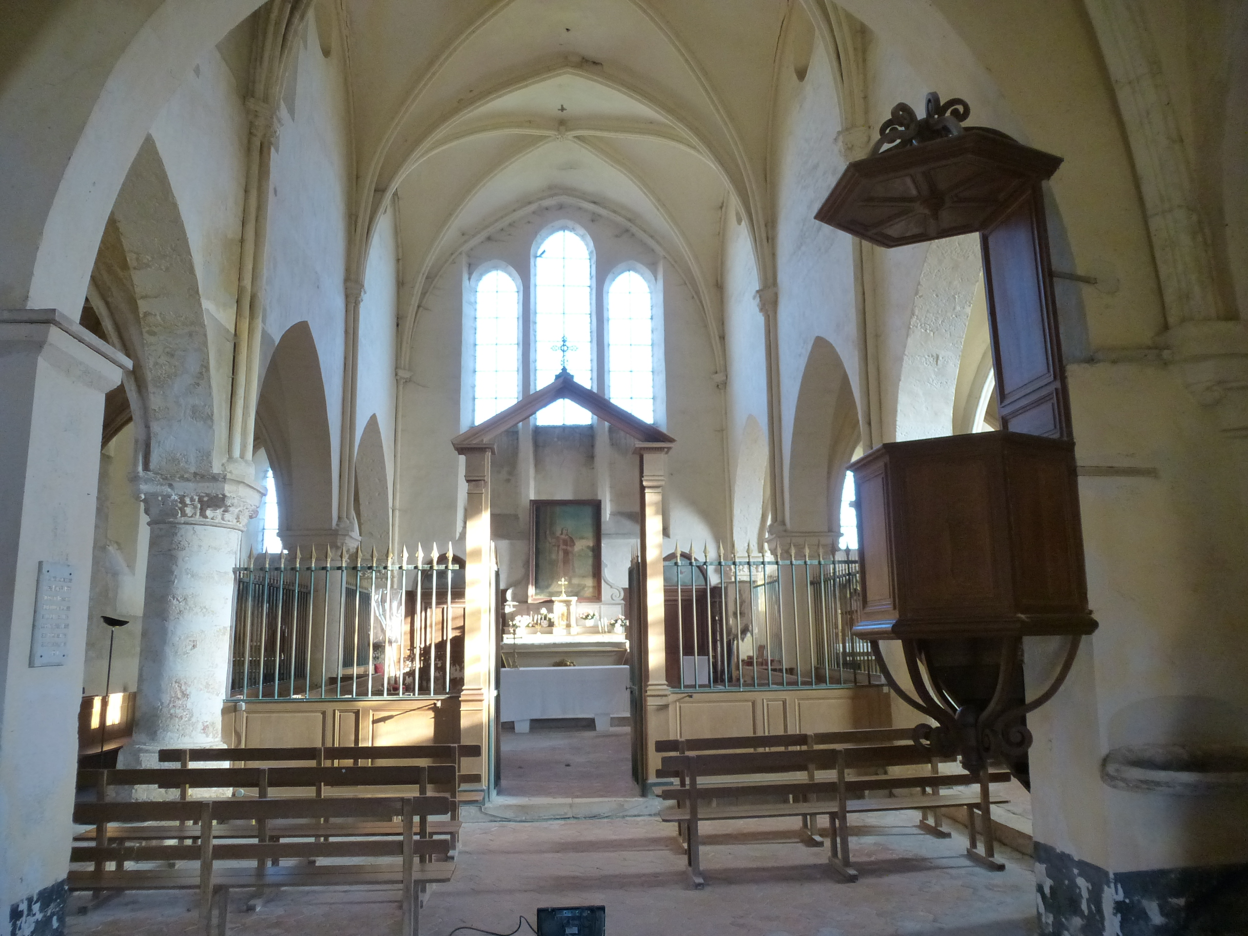 Chœur de l'église Saint-Laurent de Laval-en-Brie. (département de la Seine-et-Marne, région Île-de-France).